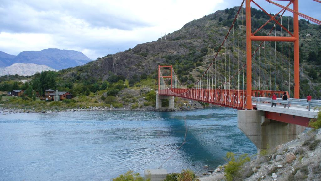 Puente Lago Gral. Carrera